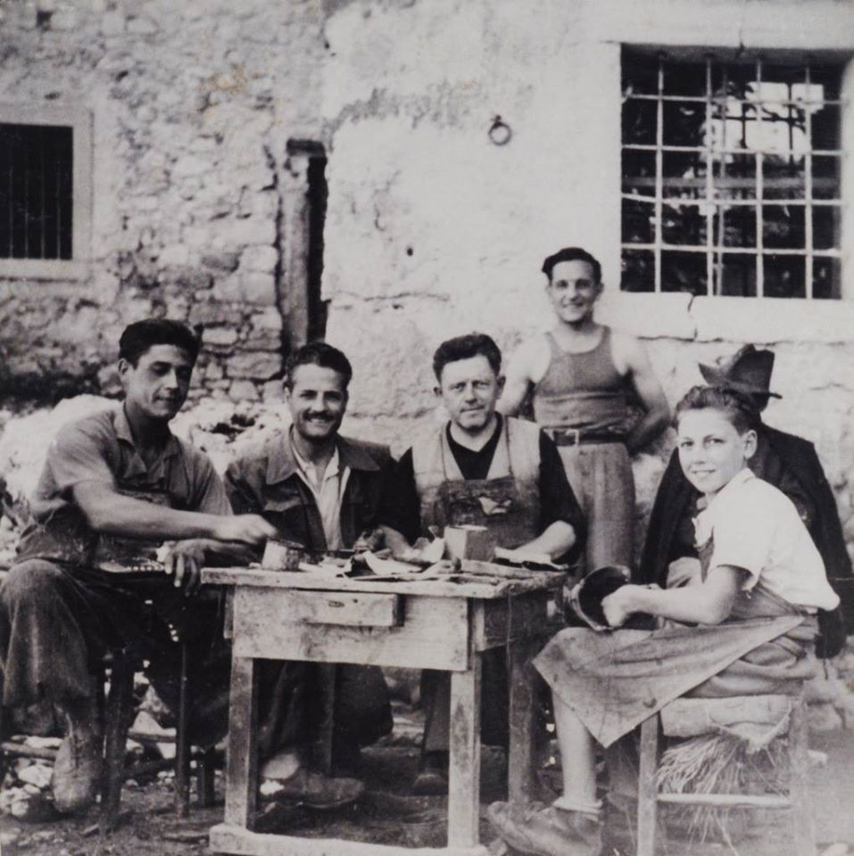 Avventori in un bar di Pezza (frazione di Marano di Valpolicella, Italia) in una fotografia d'epoca